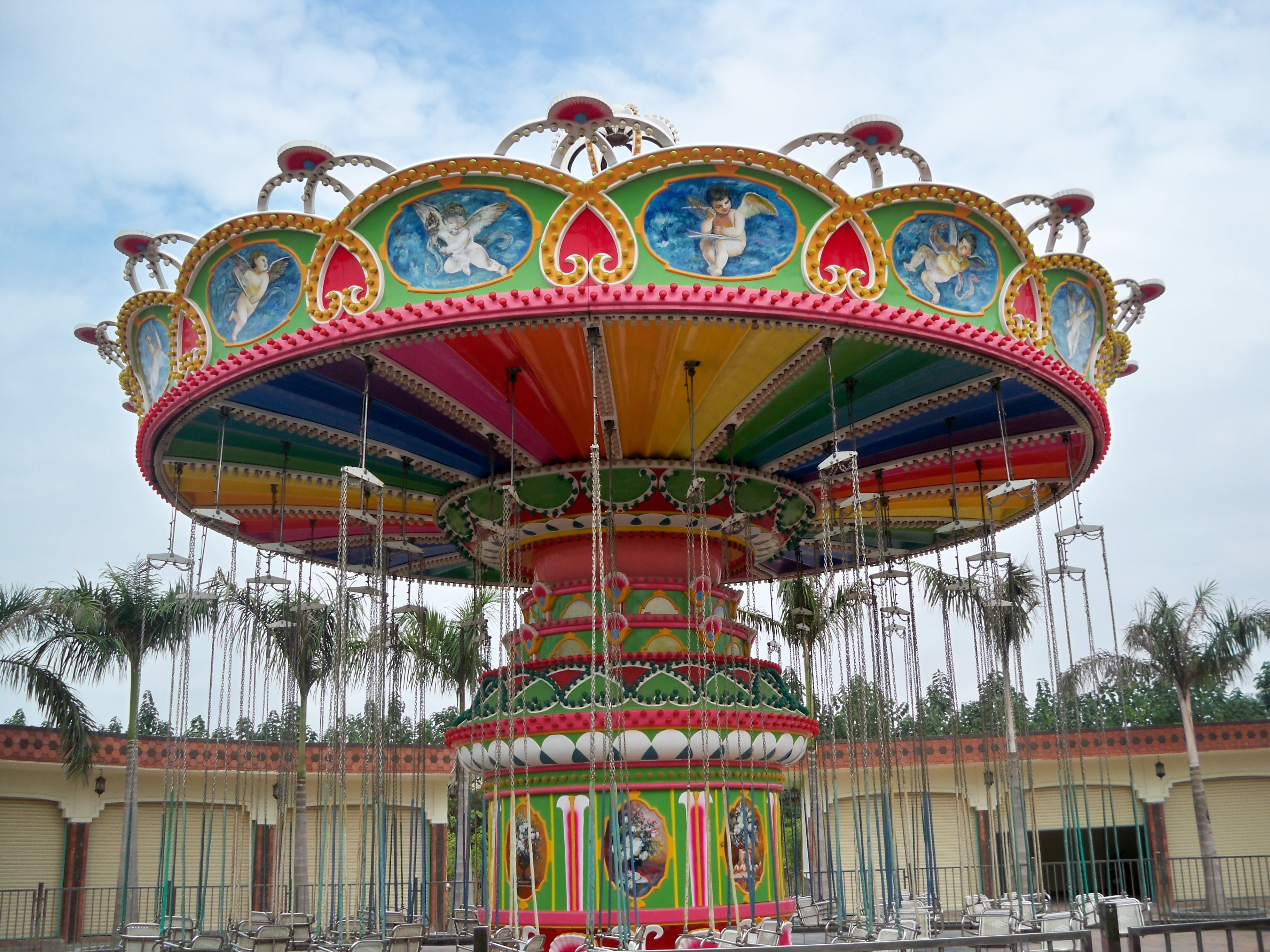 Đại Nam 7.